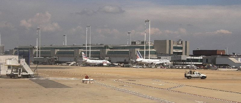 Der Flughafen Rom Fiumicino und eine Maschine der Air France